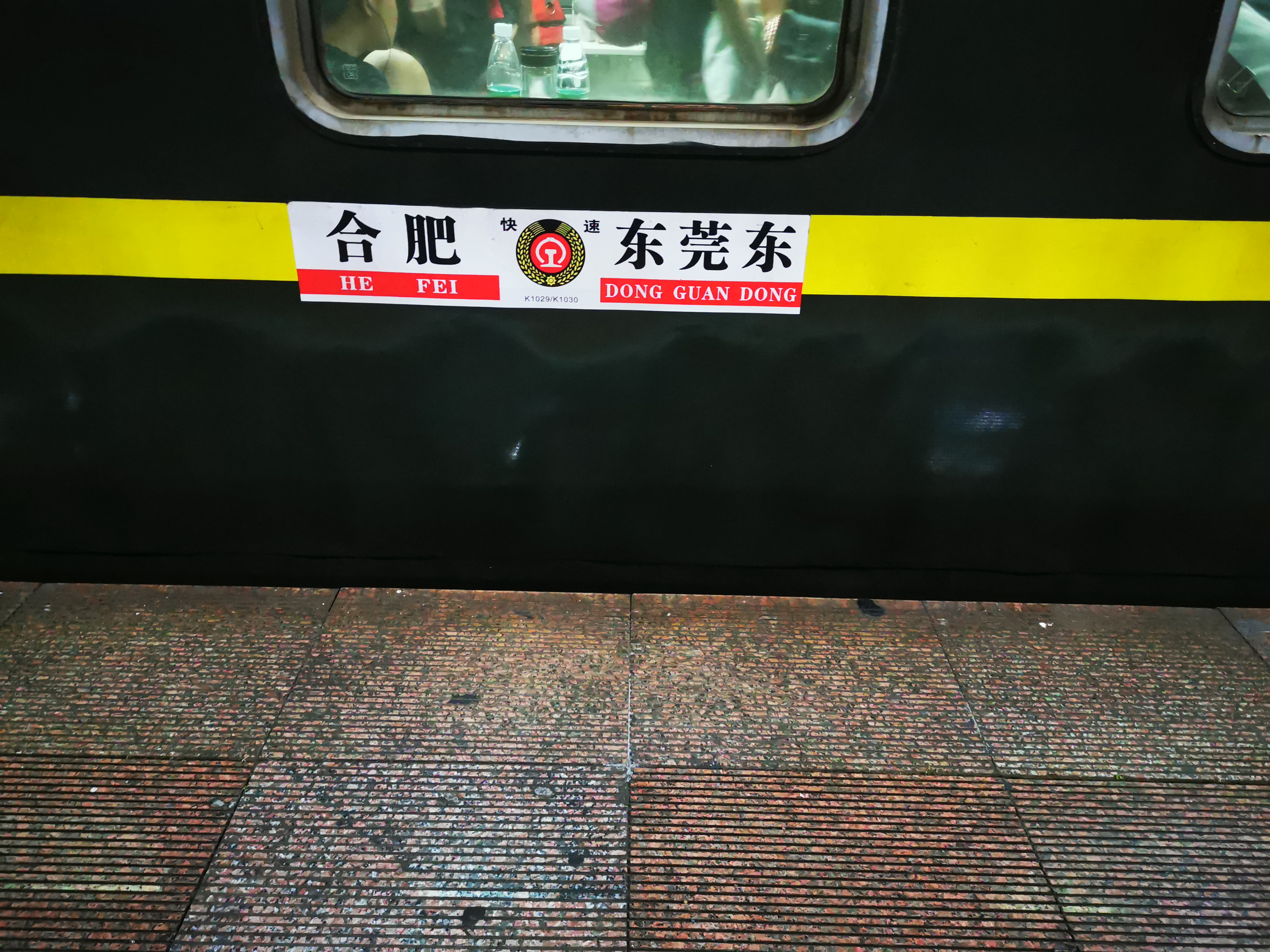 吉安站K1029-1030水牌